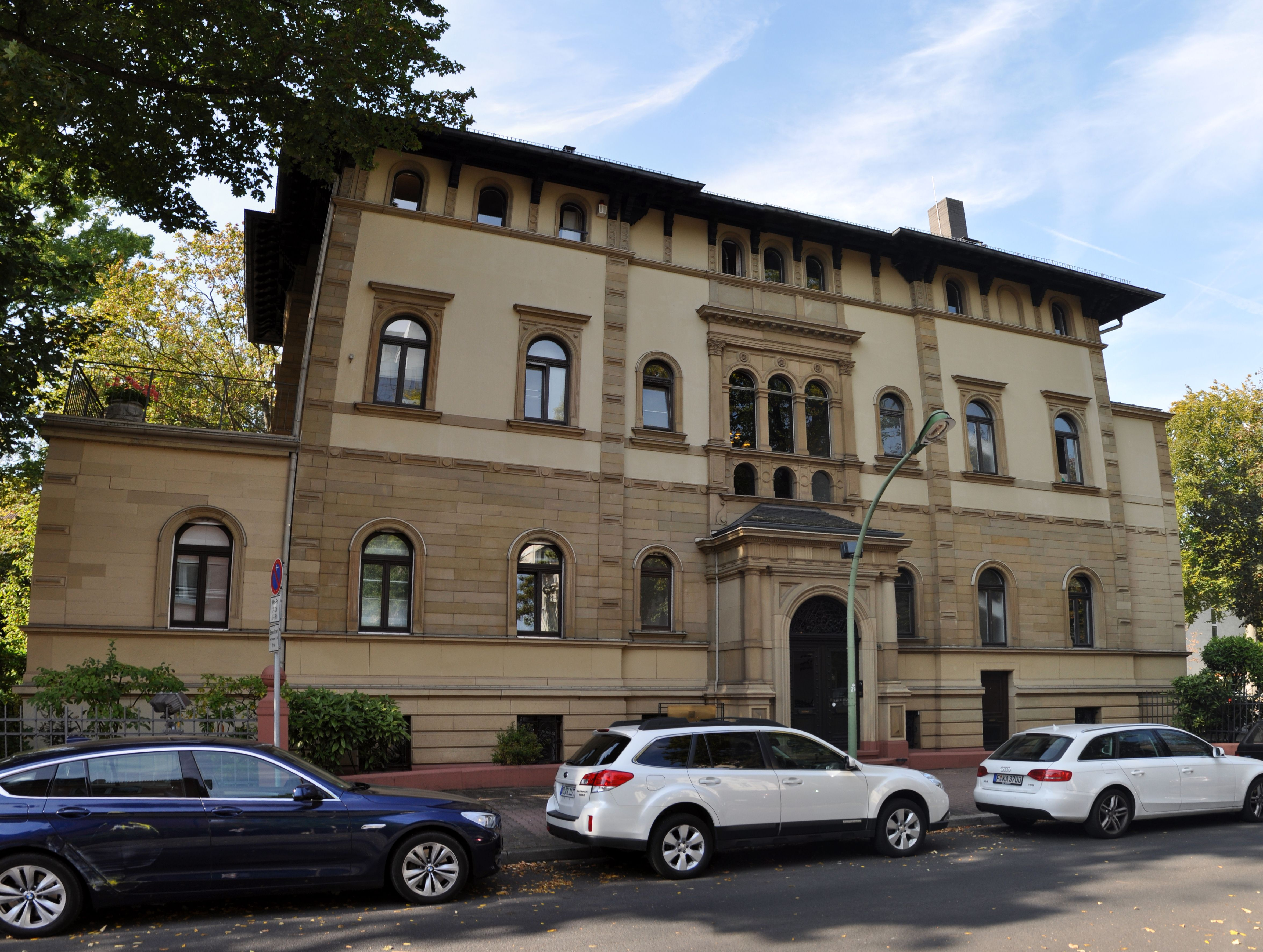 Denkmalgeschütztes Gebäude Freiherr vom Stein Straße 65 in Frankfurt. Das Bild ist aus drei Bildern zusammengesetzt.